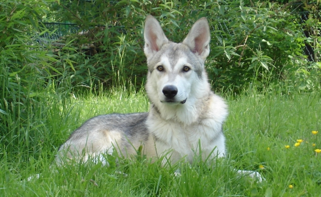 Saarlooswolfhund mit 9 Monaten